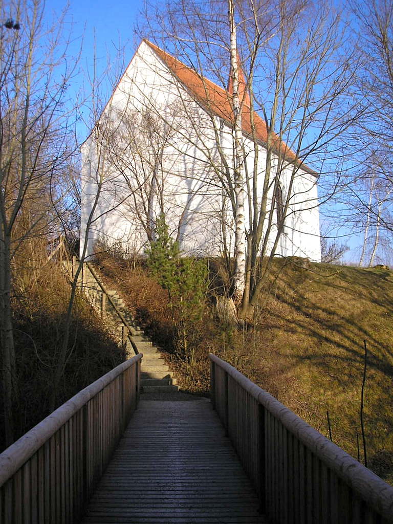 Burgstall Althegnenberg (Landkreis Fürstenfeldbruck, Oberbayern). Der Turmhügel mit der Kapelle von Westen. Eigene Aufnahme, Dez. 2007 / Motte-and-bailey castle Althegnenberg near Fuerstenfeldbruck (Upper Bavaria, Germany). The motte with the chapel, seen from the west. Own photo, Dec. 2007